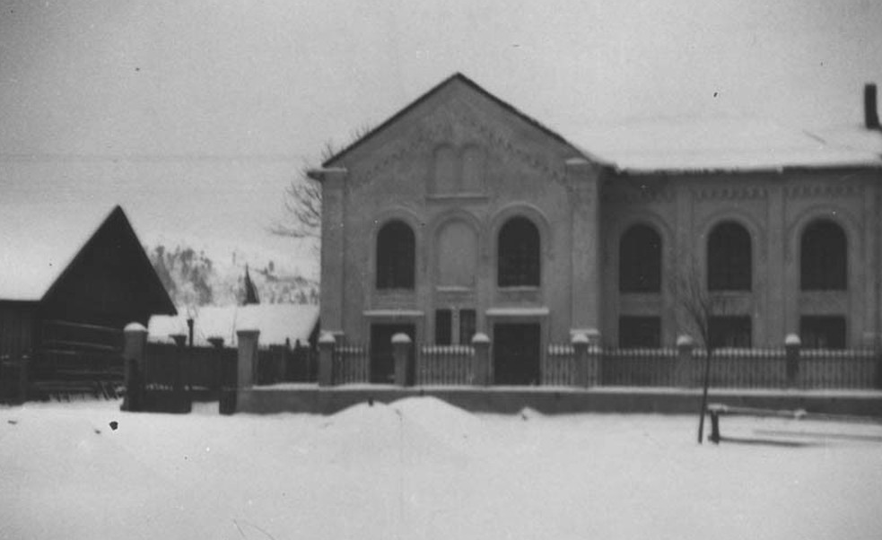 Synagoga w Milówce (województwo śląskie) przed 1939 rokiem.